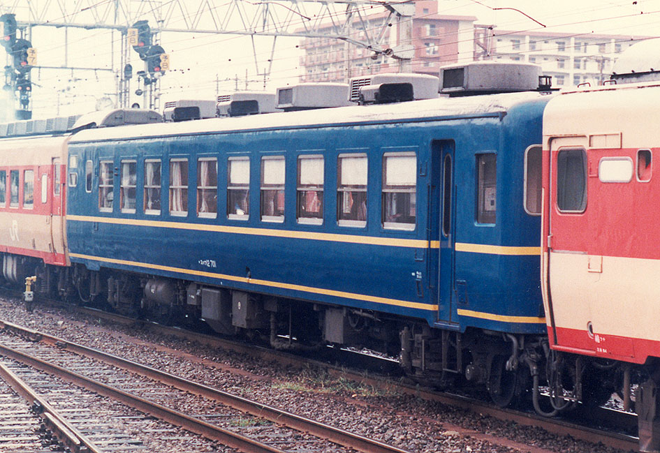 JR西日本 12系スハフ12 701 いこい